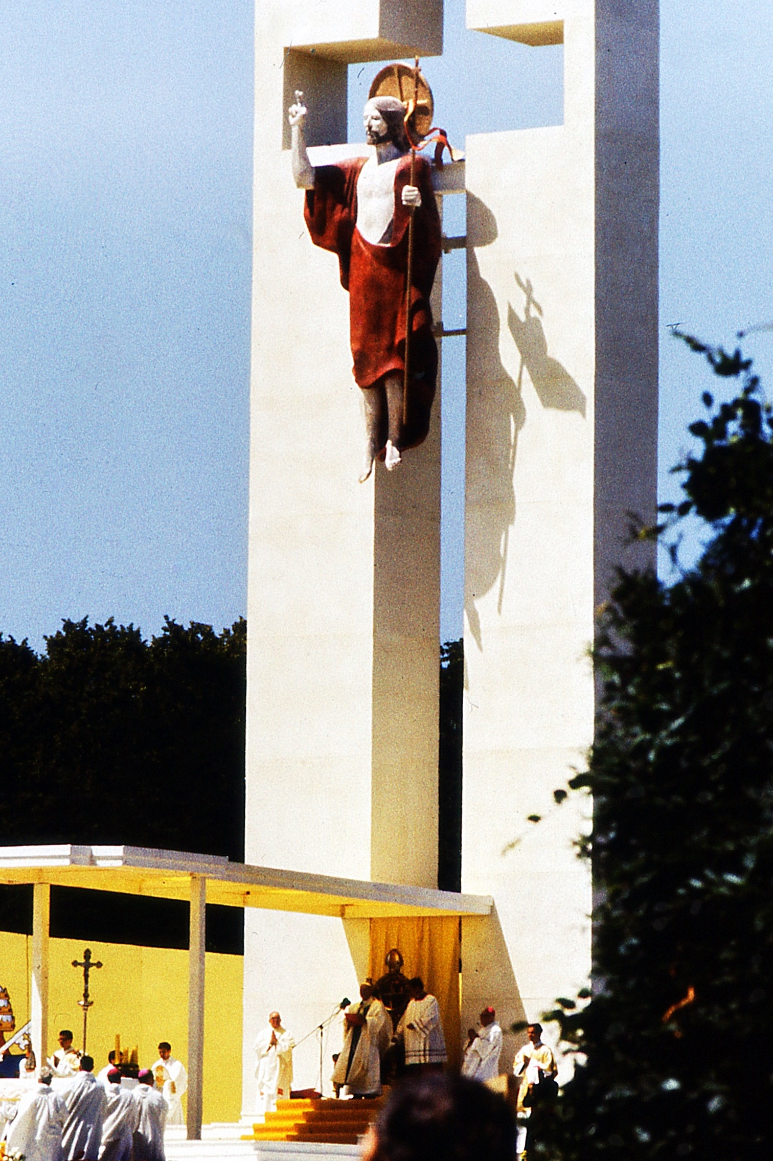 Wizyta papieża Jana Pawła II we Wrocławiu